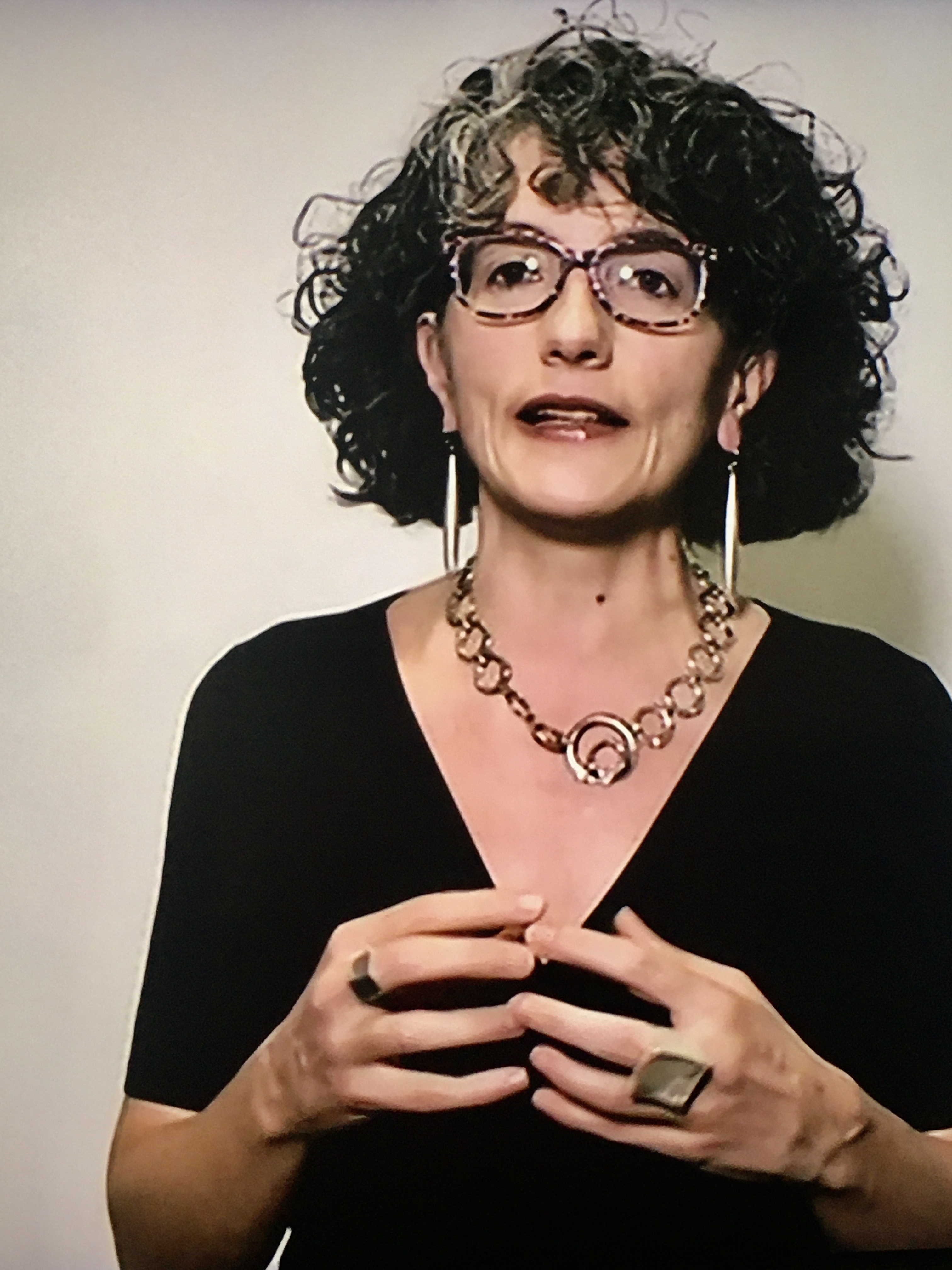 Silvia Salvatici (maggio 2020)